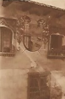 Vista de la fachada este del patio de la casa de Diego de Rueda en Segovia